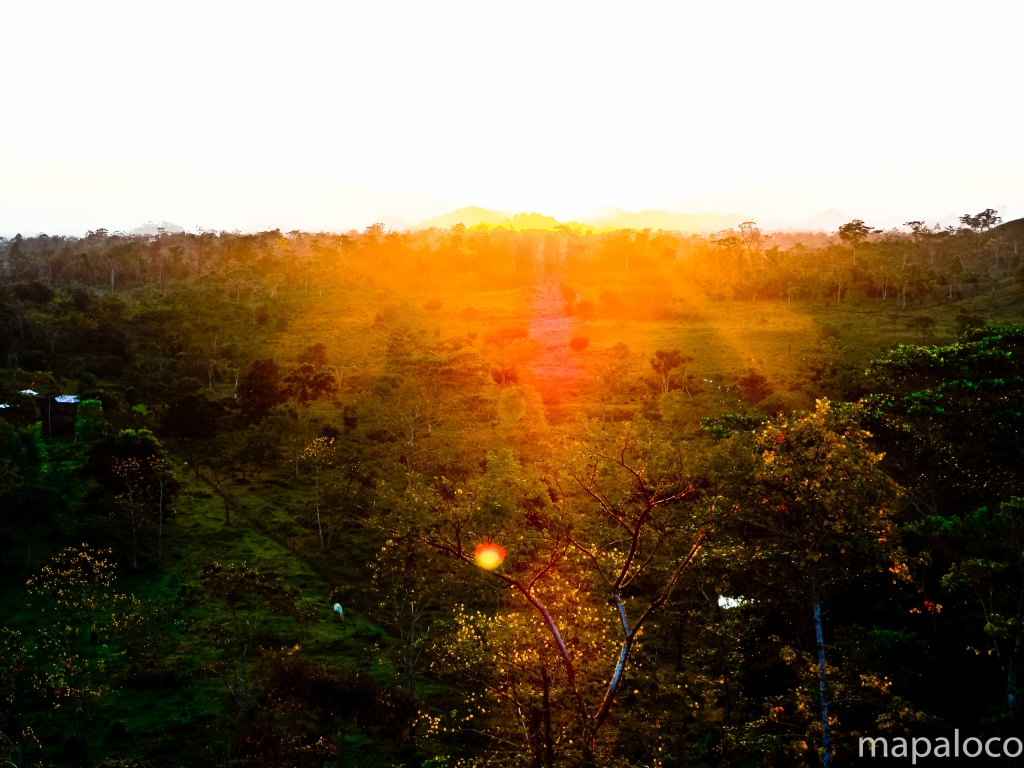 Primeros rayos solares.